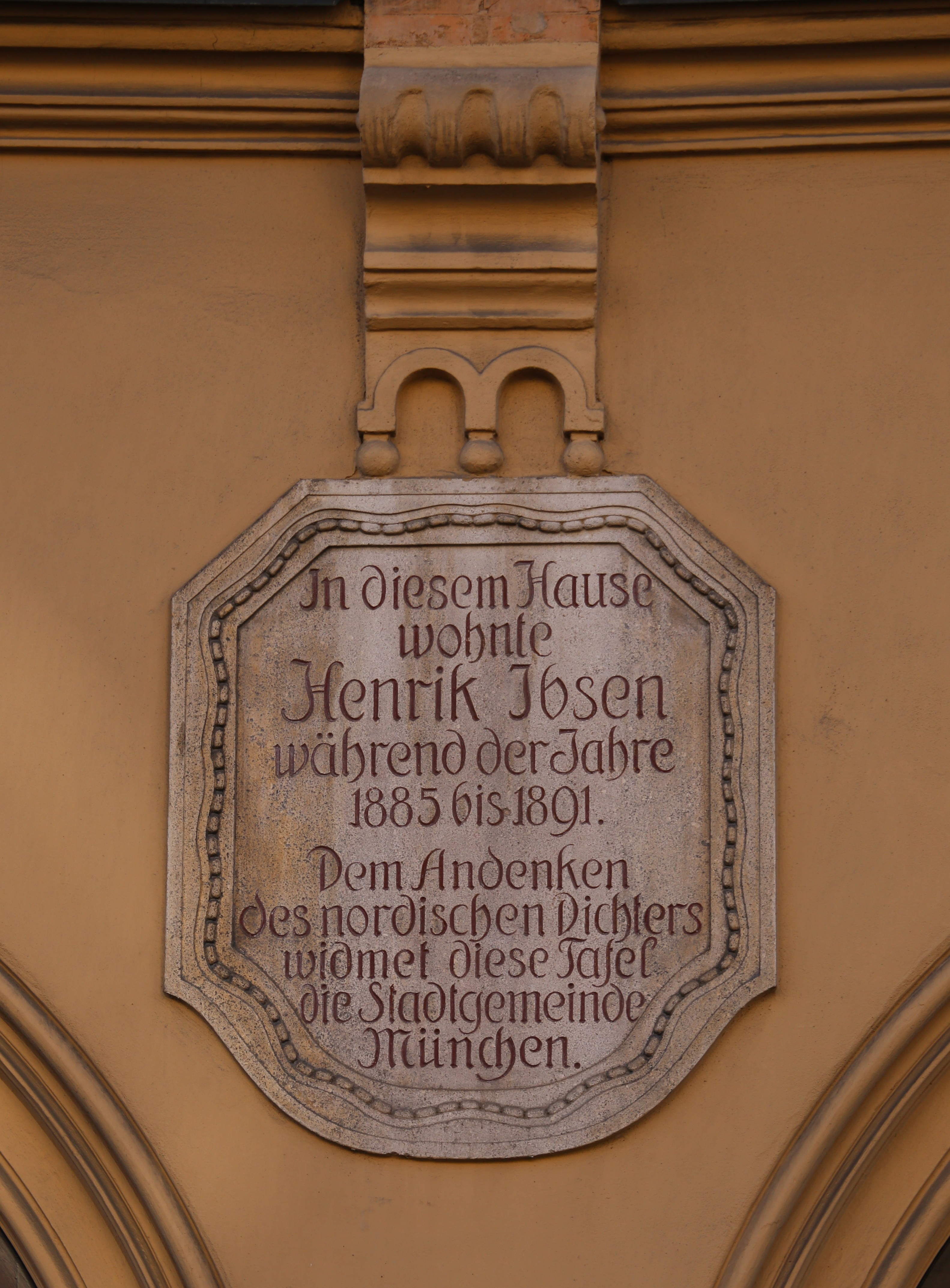 Maximilianstr. 32, München, Gedenktafel an Henrik Ibsen, der von 1885 bis 1891 in diesem Haus lebte